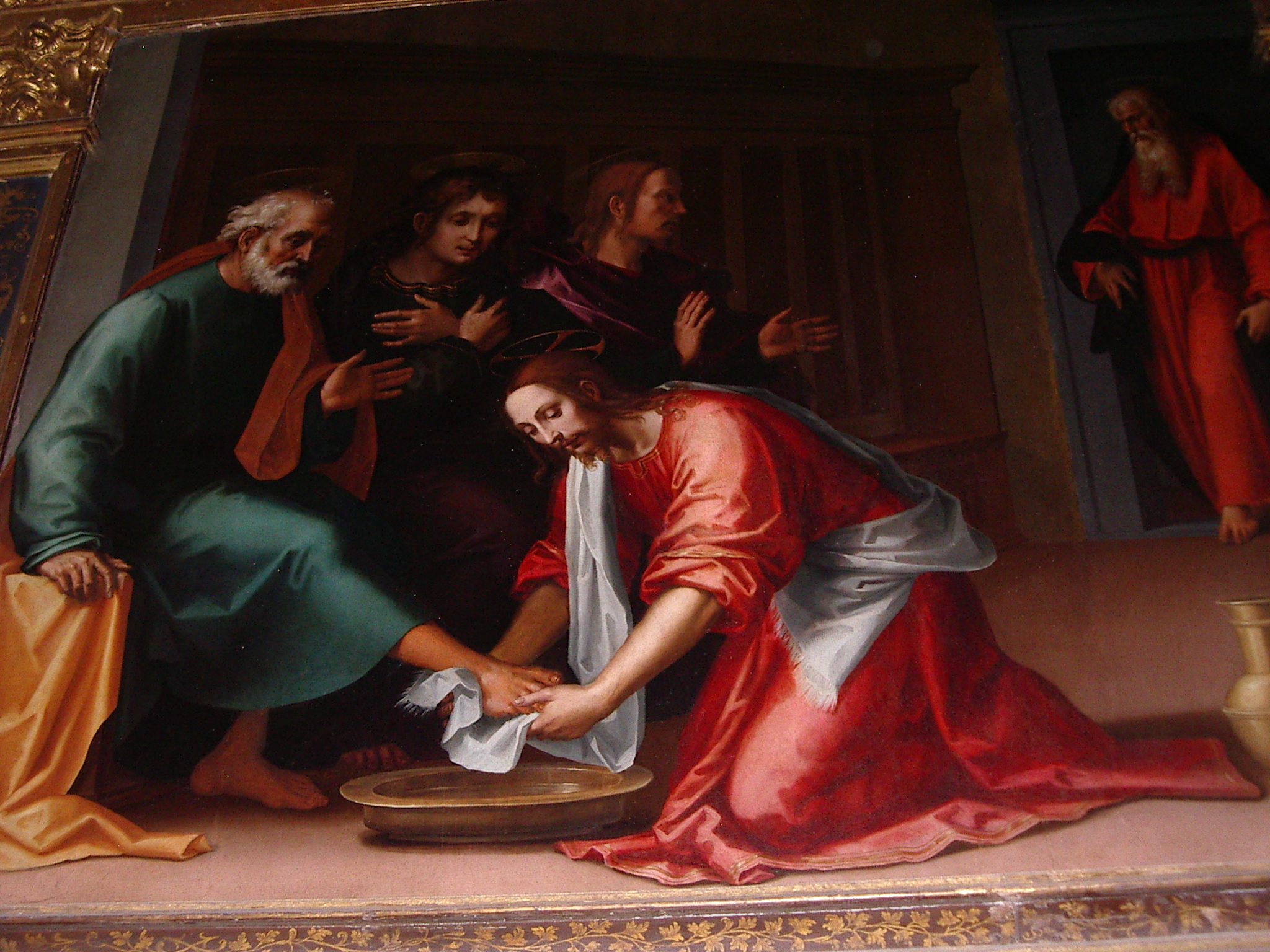 Jésus lavant les pieds aux apôtres